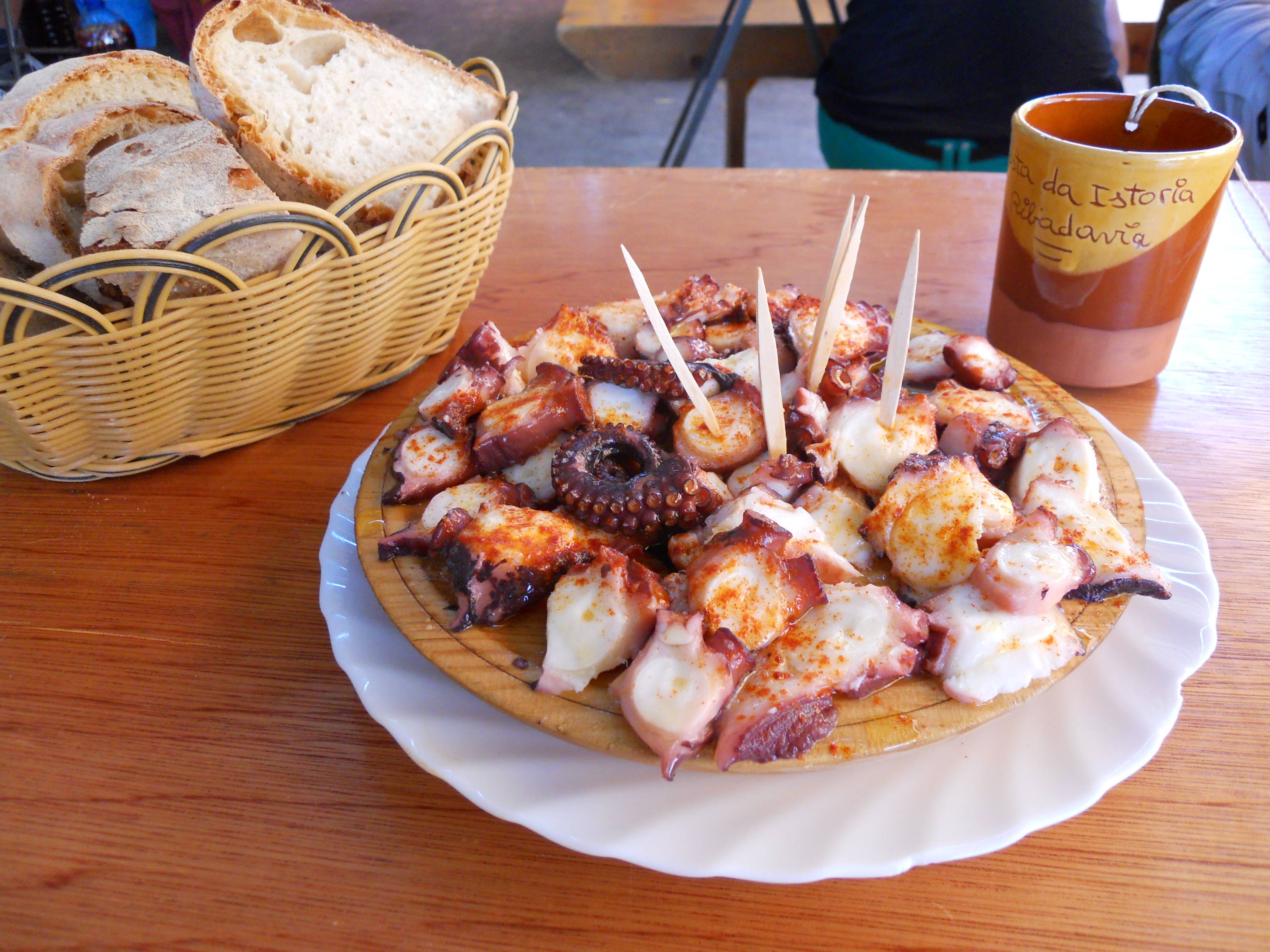 Dos raciones de pulpo con pan de Cea, para continuar con energía la fiesta.